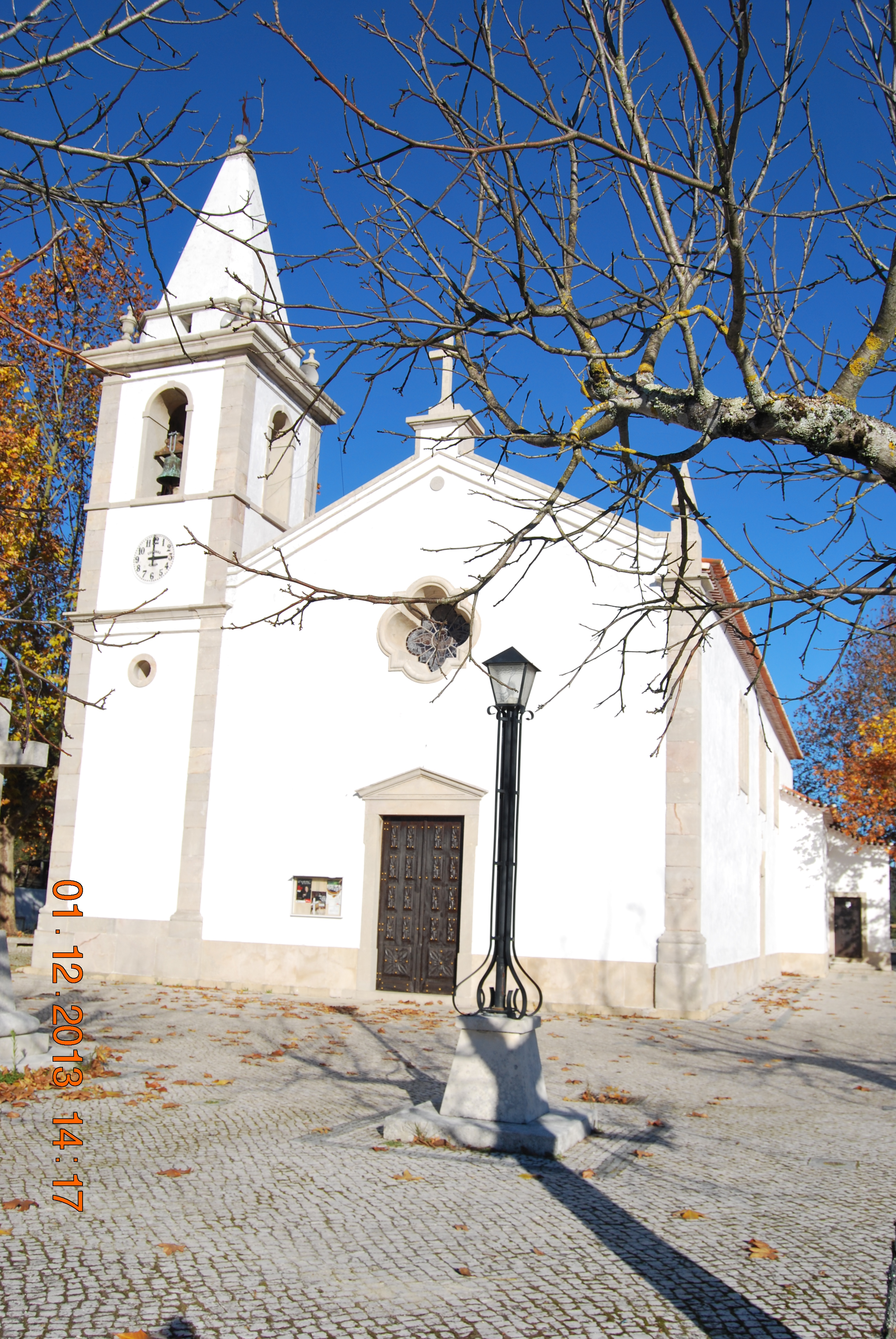 Igreja